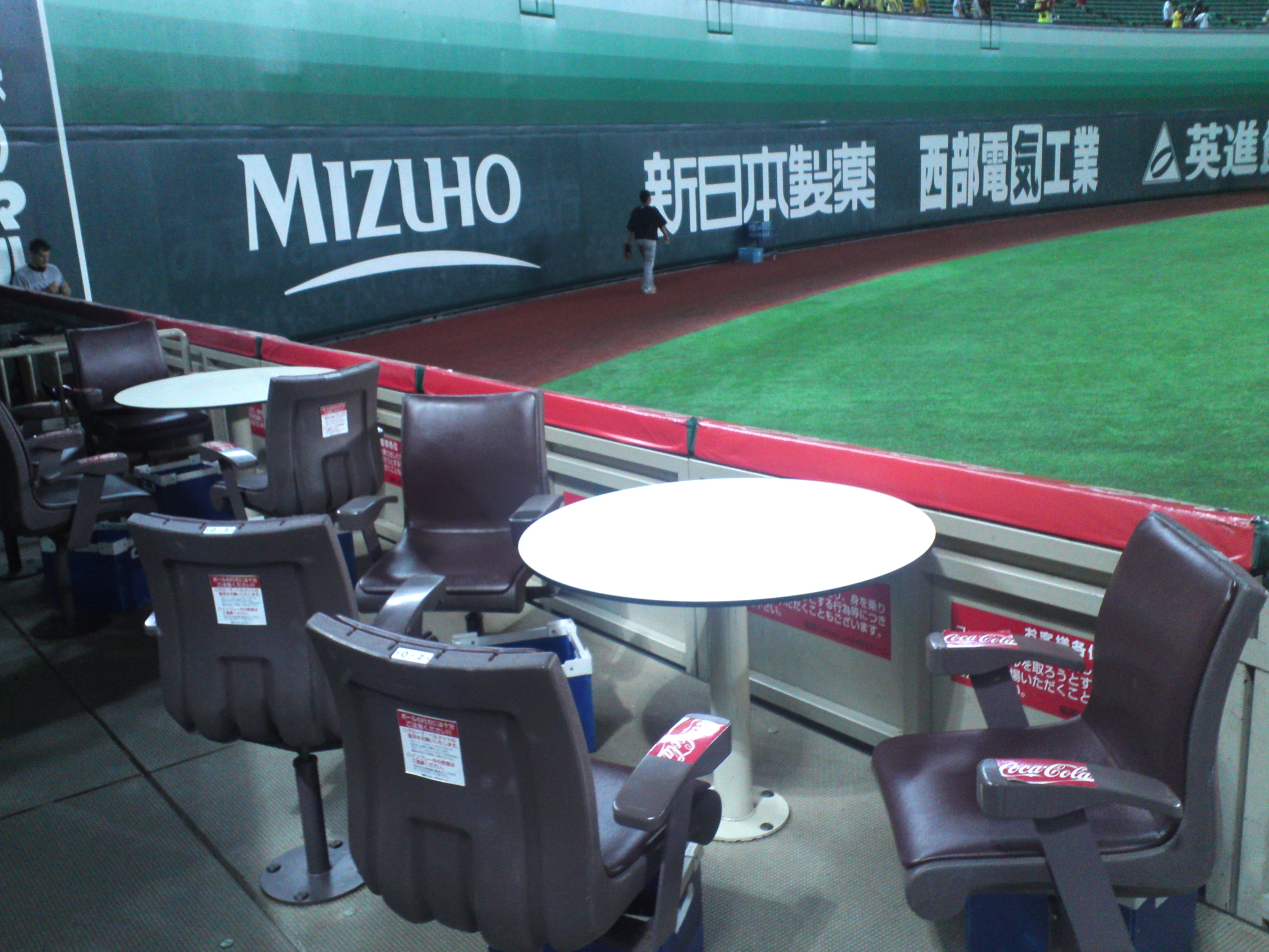 福岡ドームの座席のコカコーラシートの画像